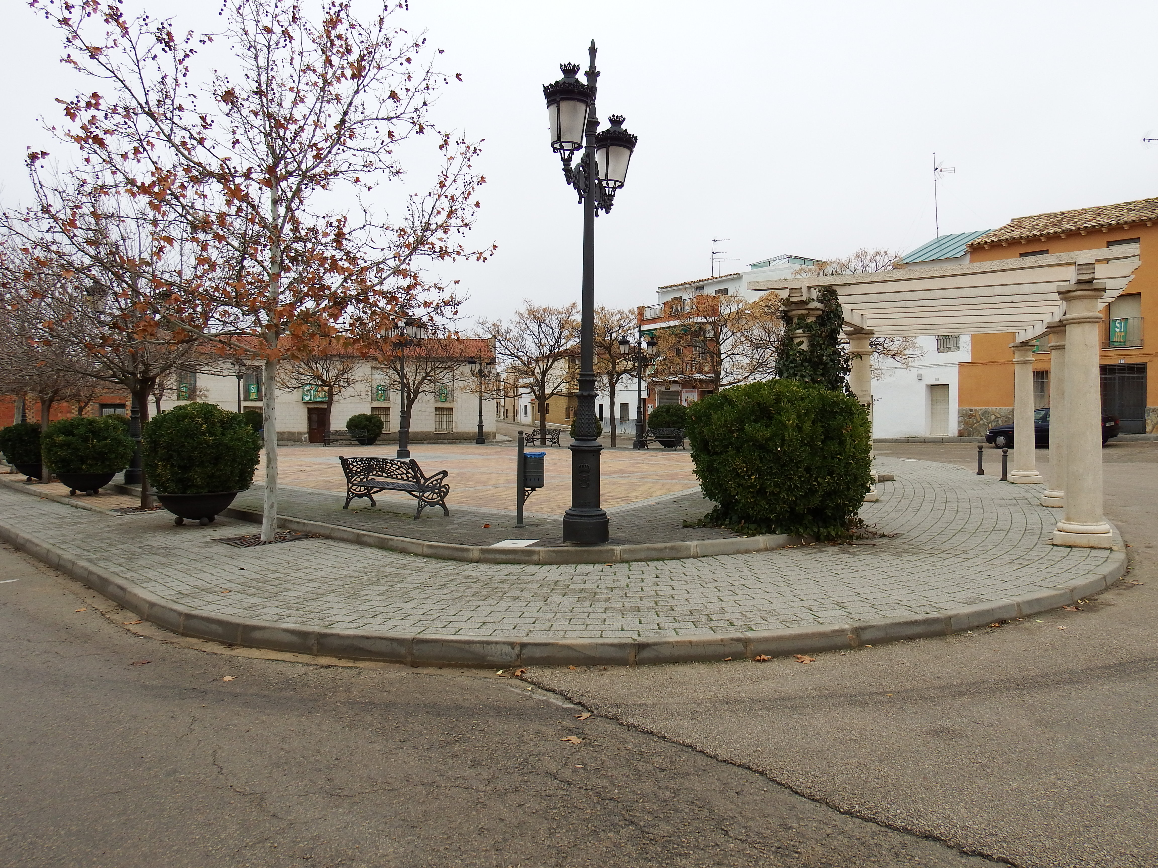 Plaza de Villar de Cañas